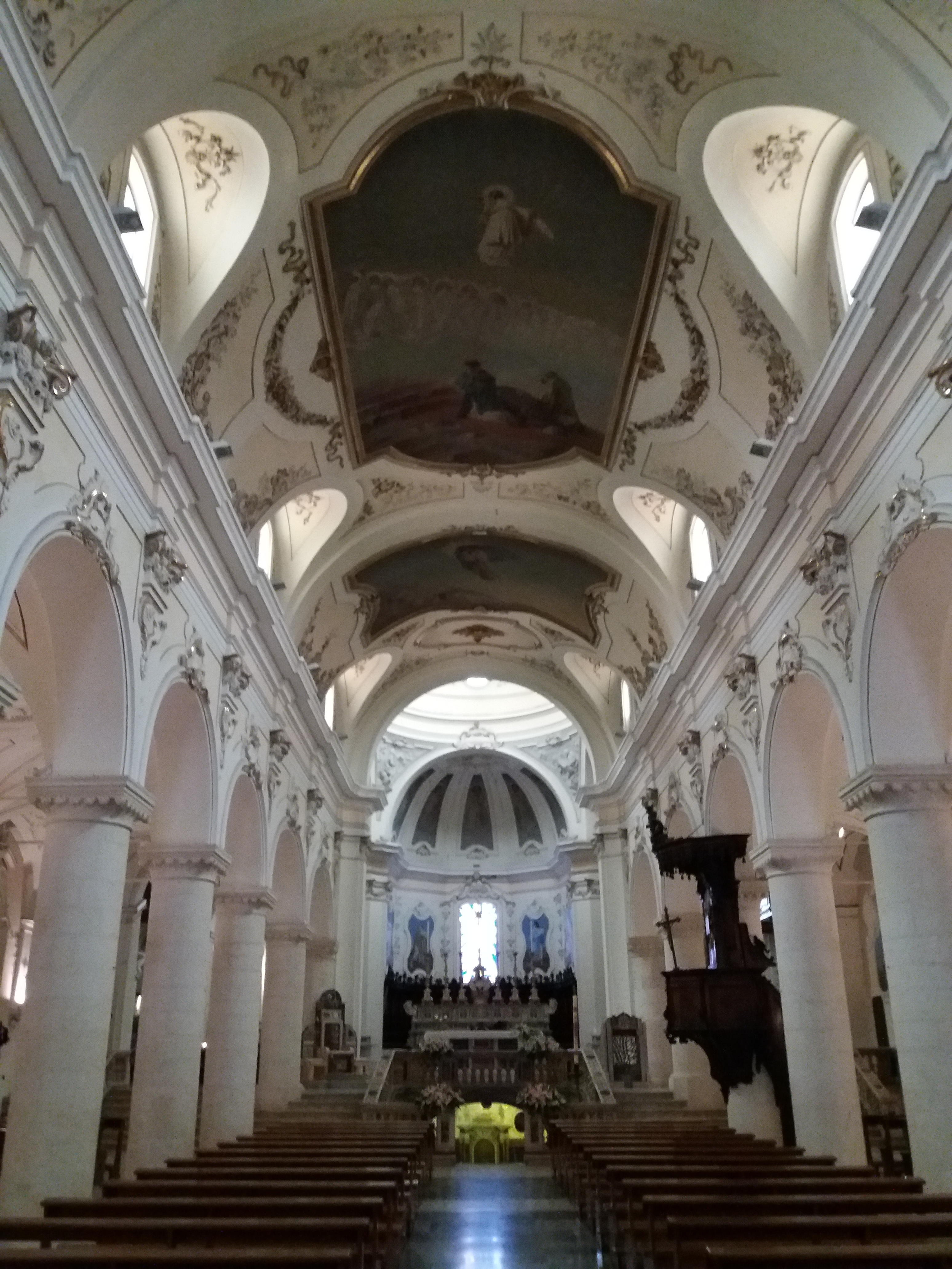 Sulmona: Cattedrale di San Panfilo